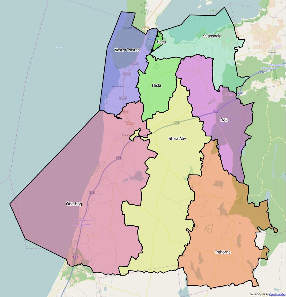 Distriktsindelningen i Ödeshögs kommun World file 59.31926795515620654 0 0 -59.31926795515620654 1605460.1682323832064867 8043690.50694532785564661